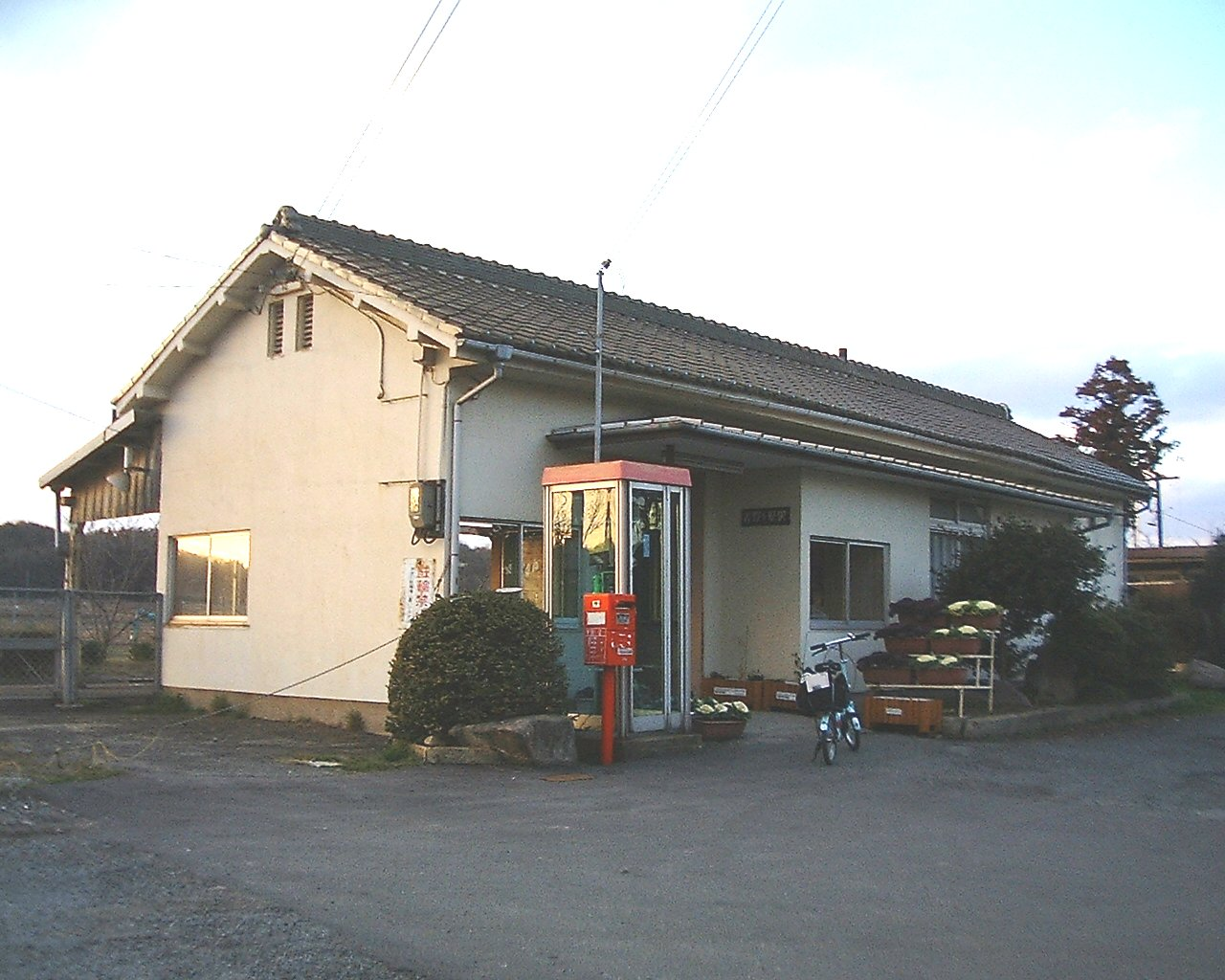 青野ヶ原駅旧駅舎